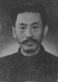 中文（台灣）: 中國人民政治協商會議第一屆全體會議代表